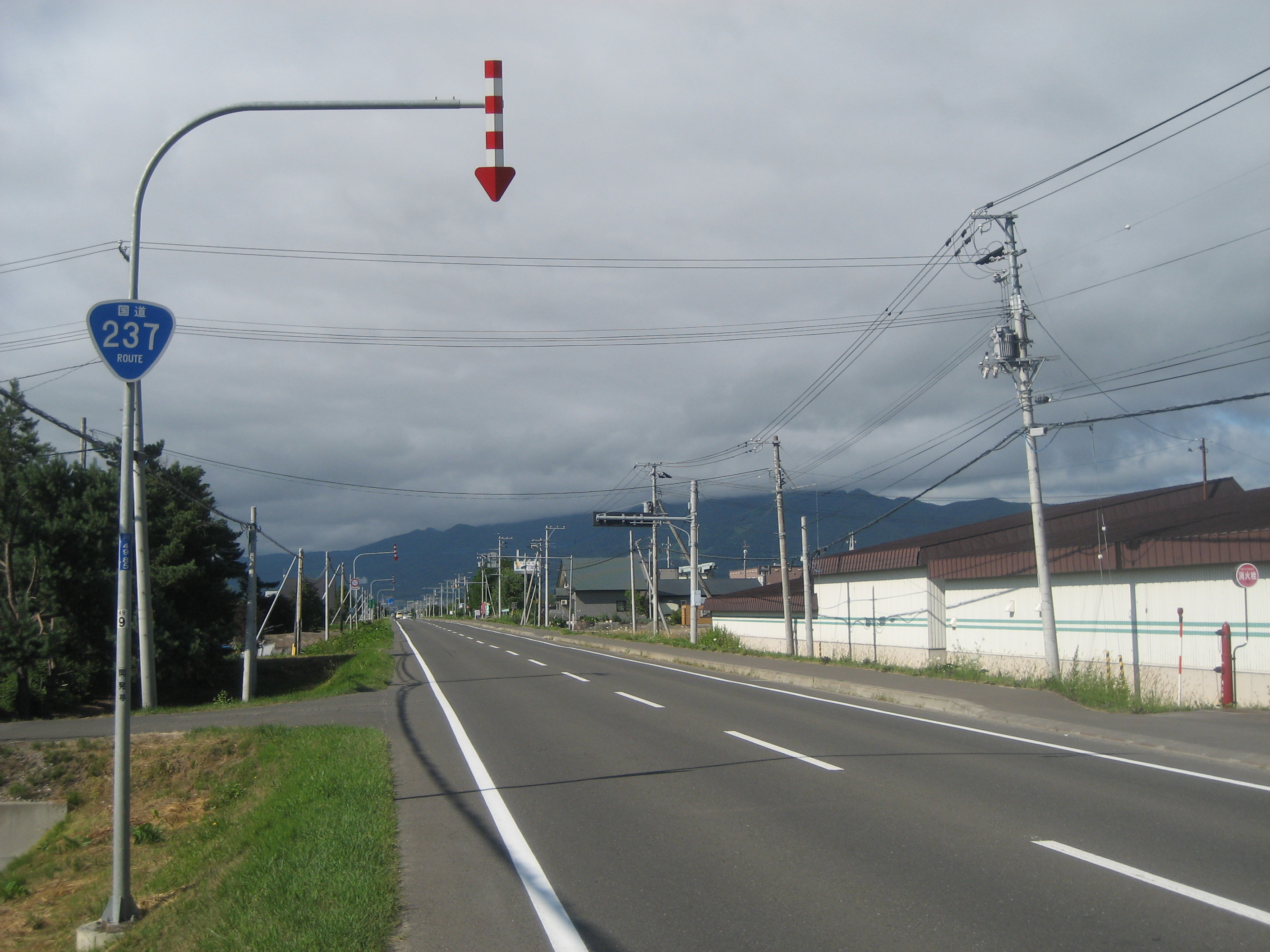 国道２３７号線 中富良野町新町付近（富良野方面を撮影）